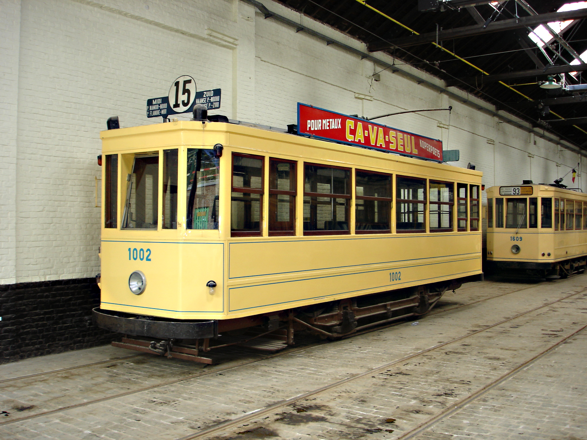 Standard-motorwagen 1002, Brussel